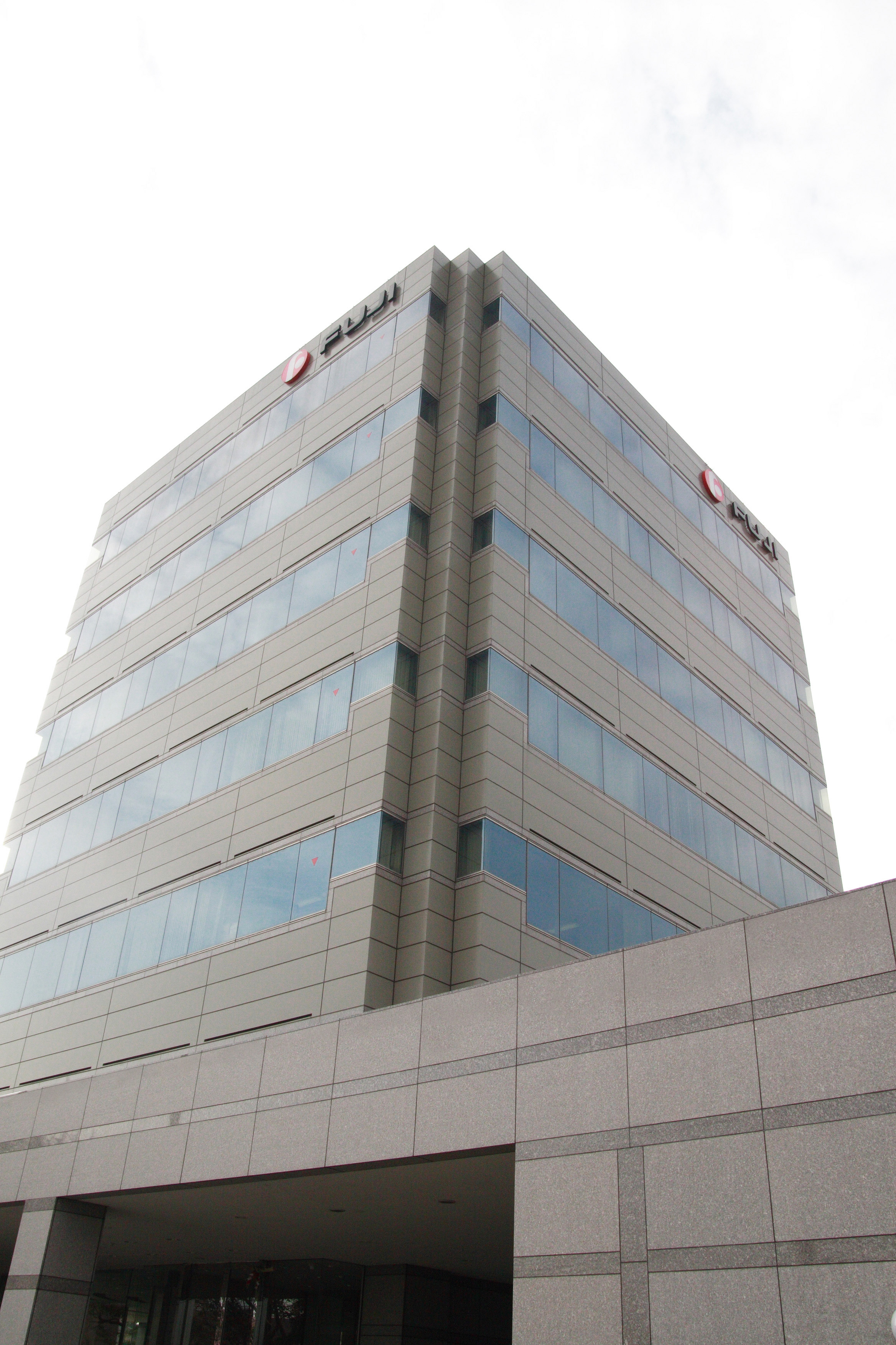 富士産業株式会社 香川県丸亀市本社ビル